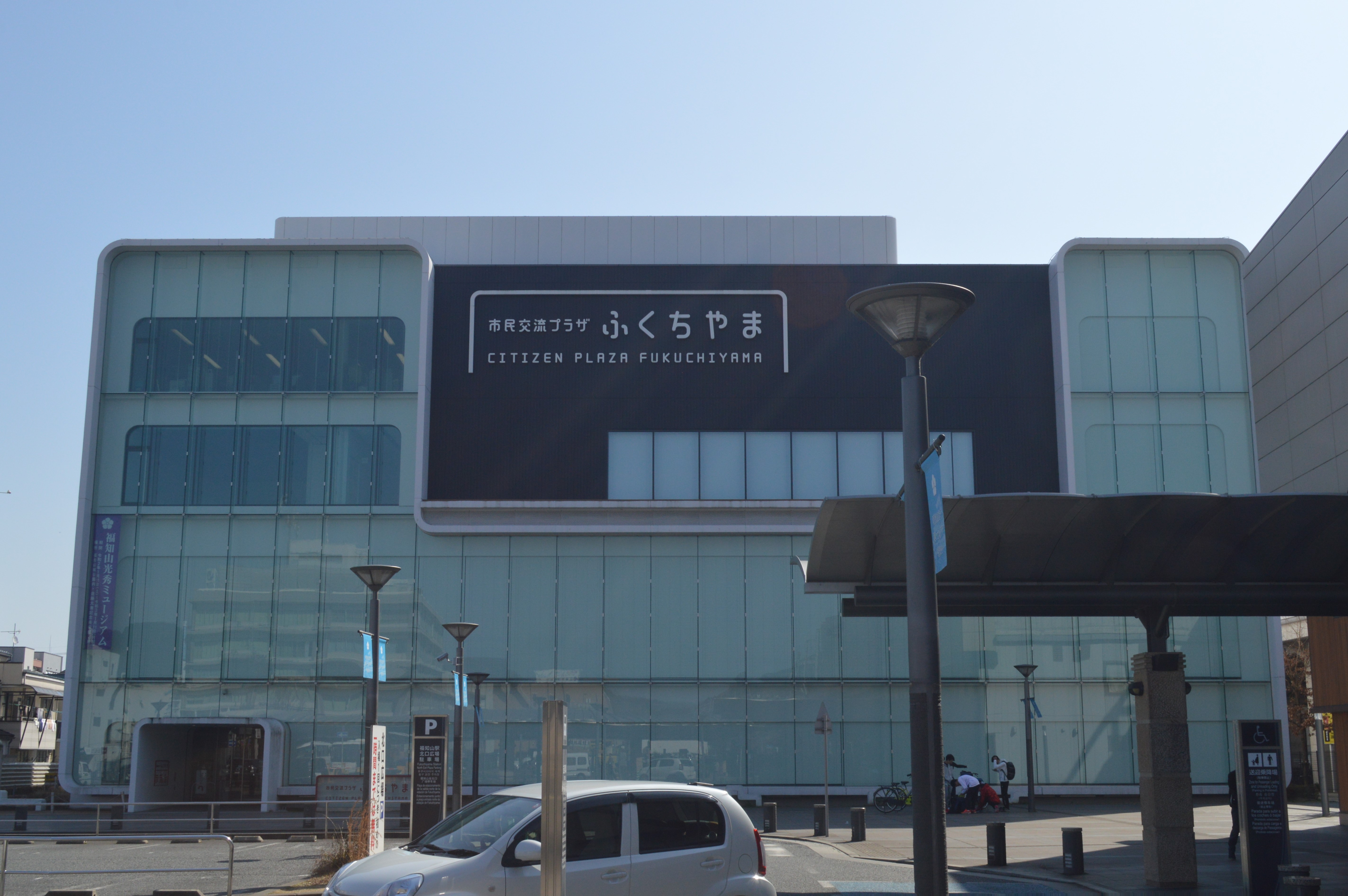 京都府福知山市駅前町400にある市民交流プラザふくちやま。福知山市立図書館中央館が入っている。